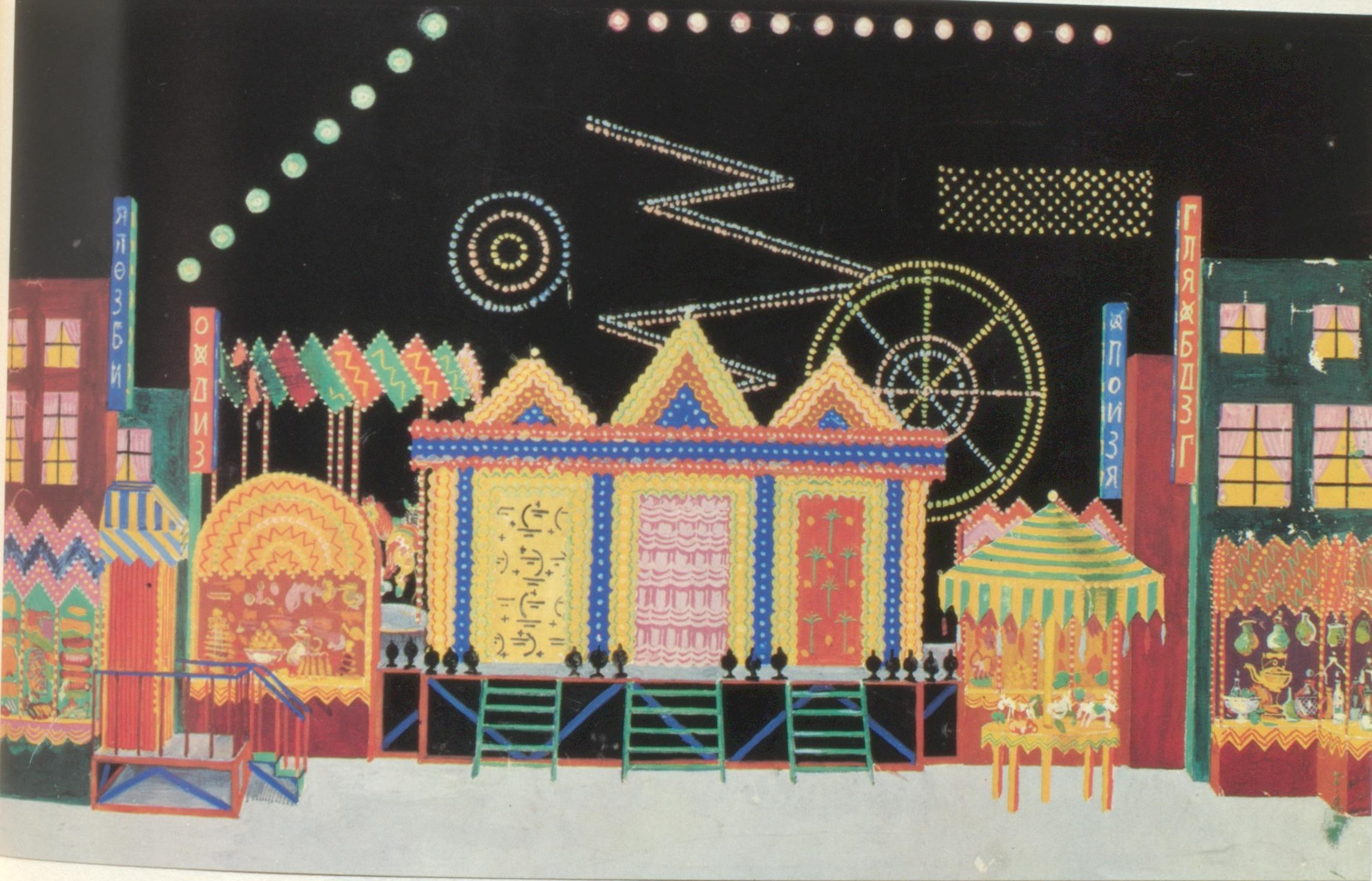 Ewald Dülberg Bühnenbildentwurf zu Igor Strawinsky Petruschka 1. Bild Krolloper 1928